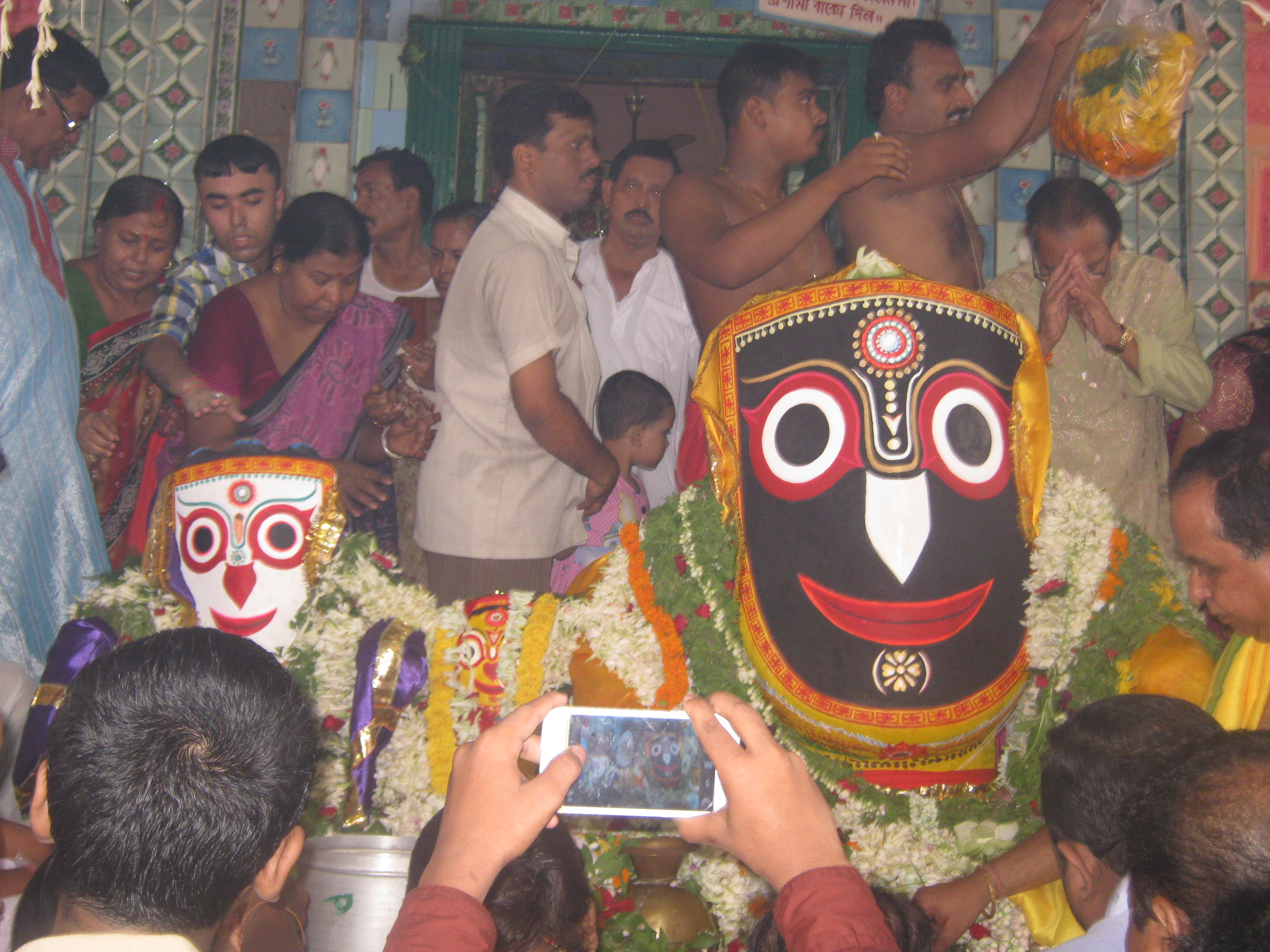 Sri Sri Jagannathdev in temple